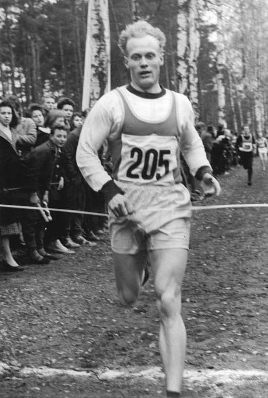 Siegfried Valentin Zentralbild Wendorf Bey-L 30.3.1958 Berliner Waldlaufmeisterschaften in Friedrichshagen In Berlin-Friedrichshagen wurden am Sonntag, dem 30.3.58, die Berliner Waldlaufmeisterschaften 1958 entschieden. Diese Wettkämpfe waren für die Berliner die Generalprobe für die Mitte April in Zittau stattfindenden Deutschen Waldlauf-Meisterschaften. UBz: Beim Langlauf der Herren über 2500 m siegte Siegfried Valentin (ASK-Vorwärts) .